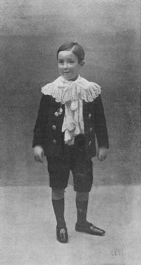 Infante Alfonso, por Franzen.